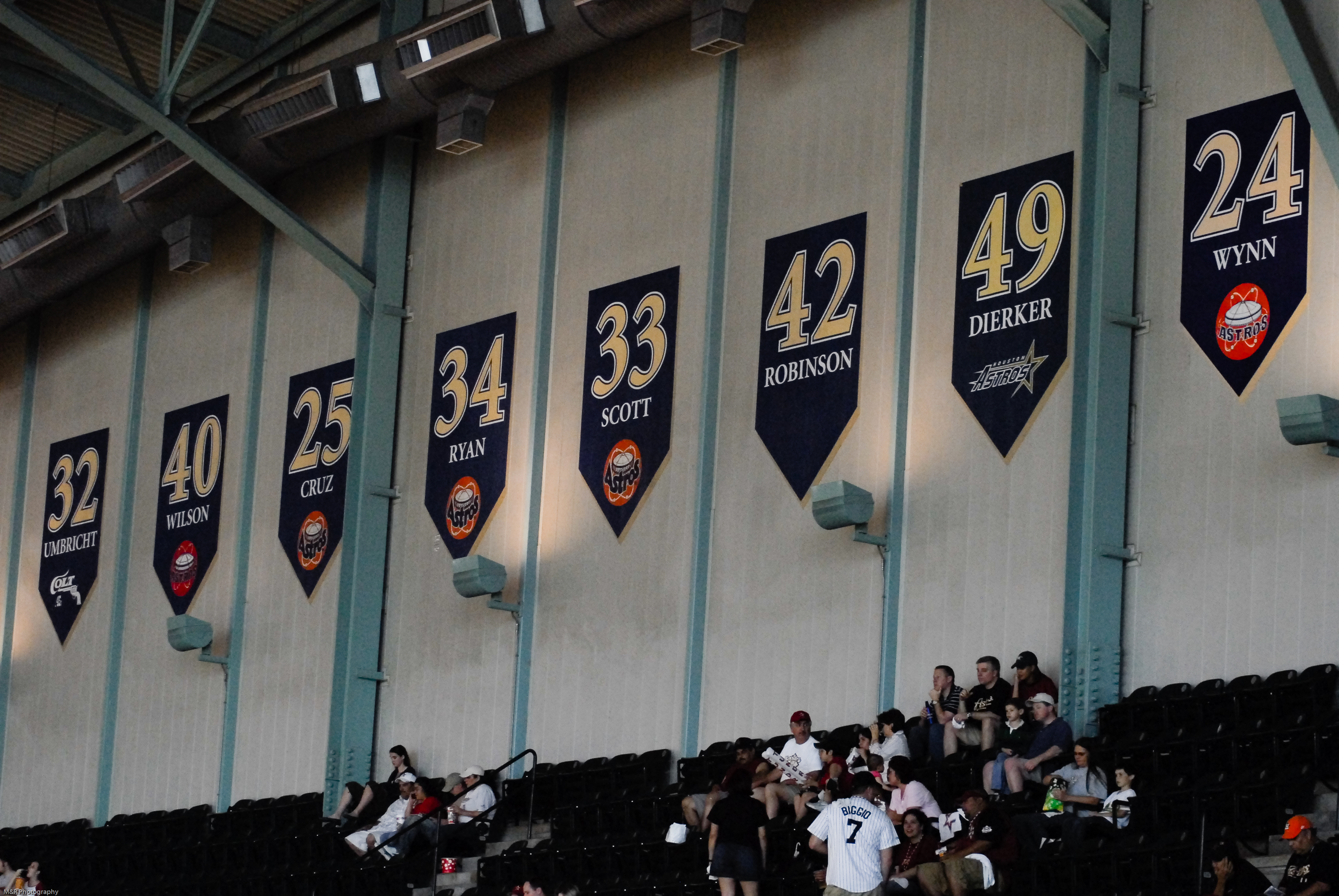 Astros vs. Pirates April 2, 2007